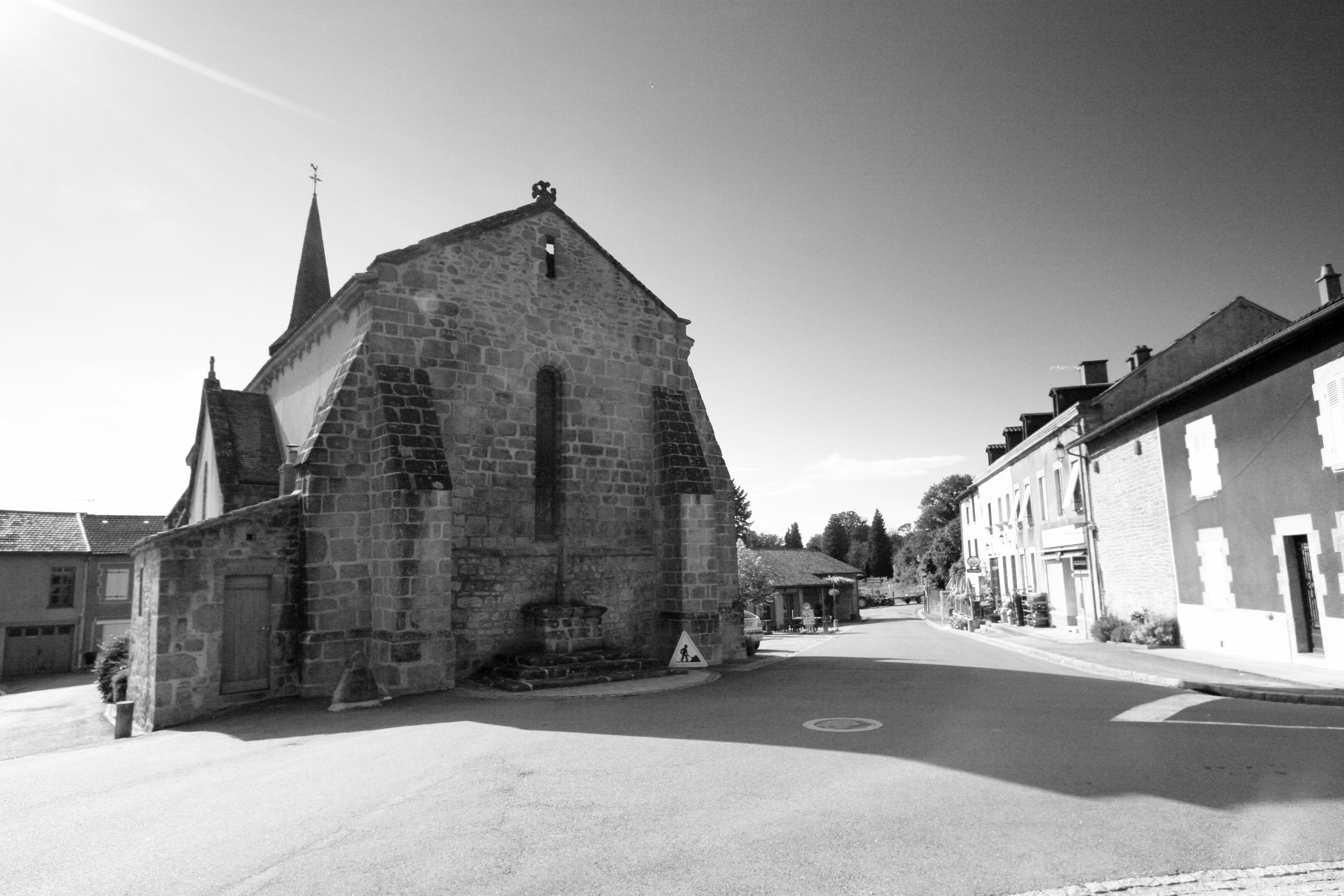 Eglise de Saint-Pardoux, Haute-Vienne, France